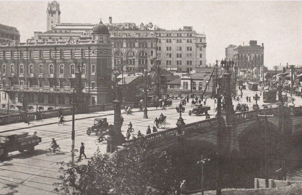 帝国製麻 のちの帝国繊維 日本橋